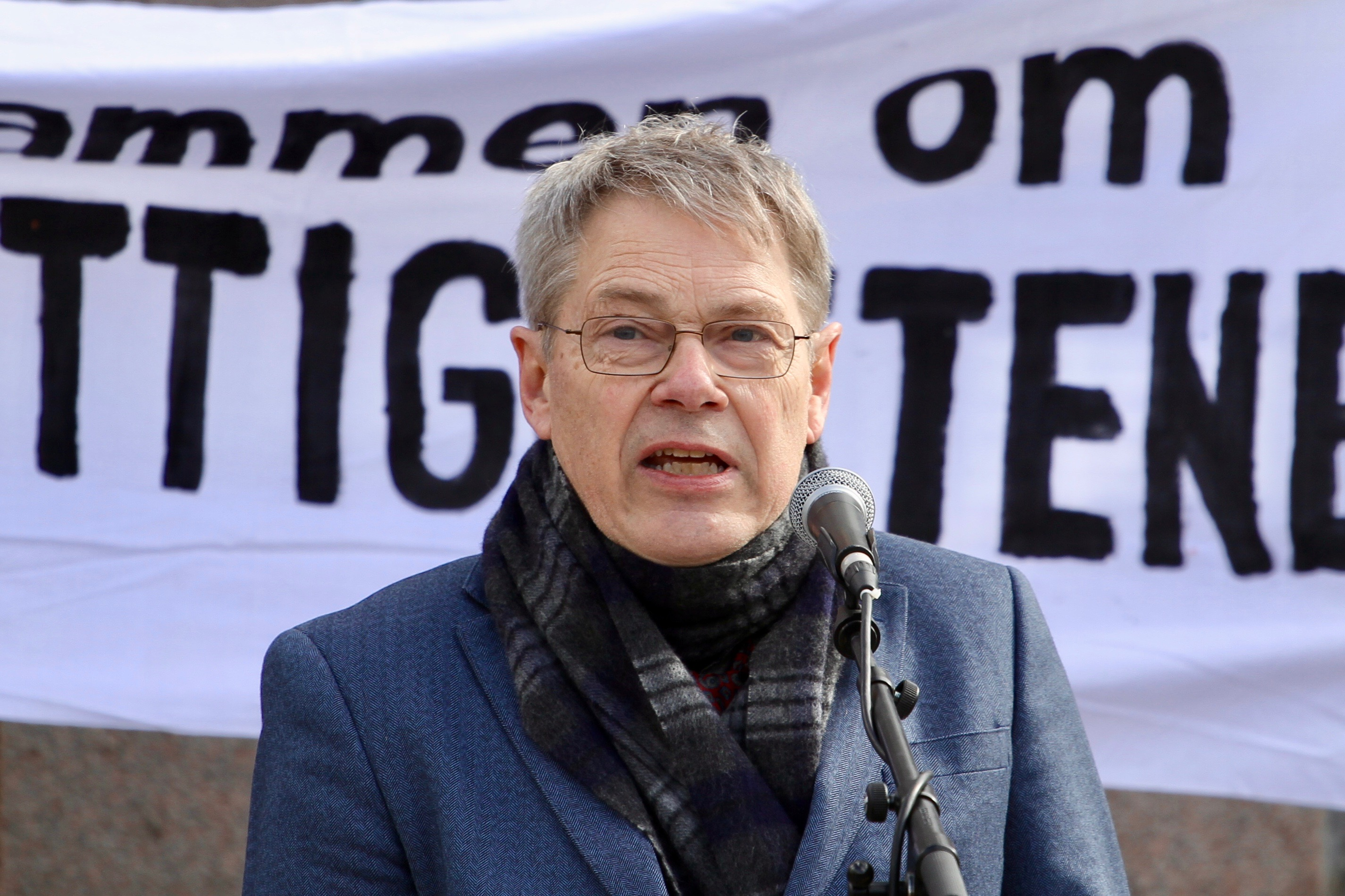 Dagfinn Eckhoff taler under Ateistenes dag 2019.